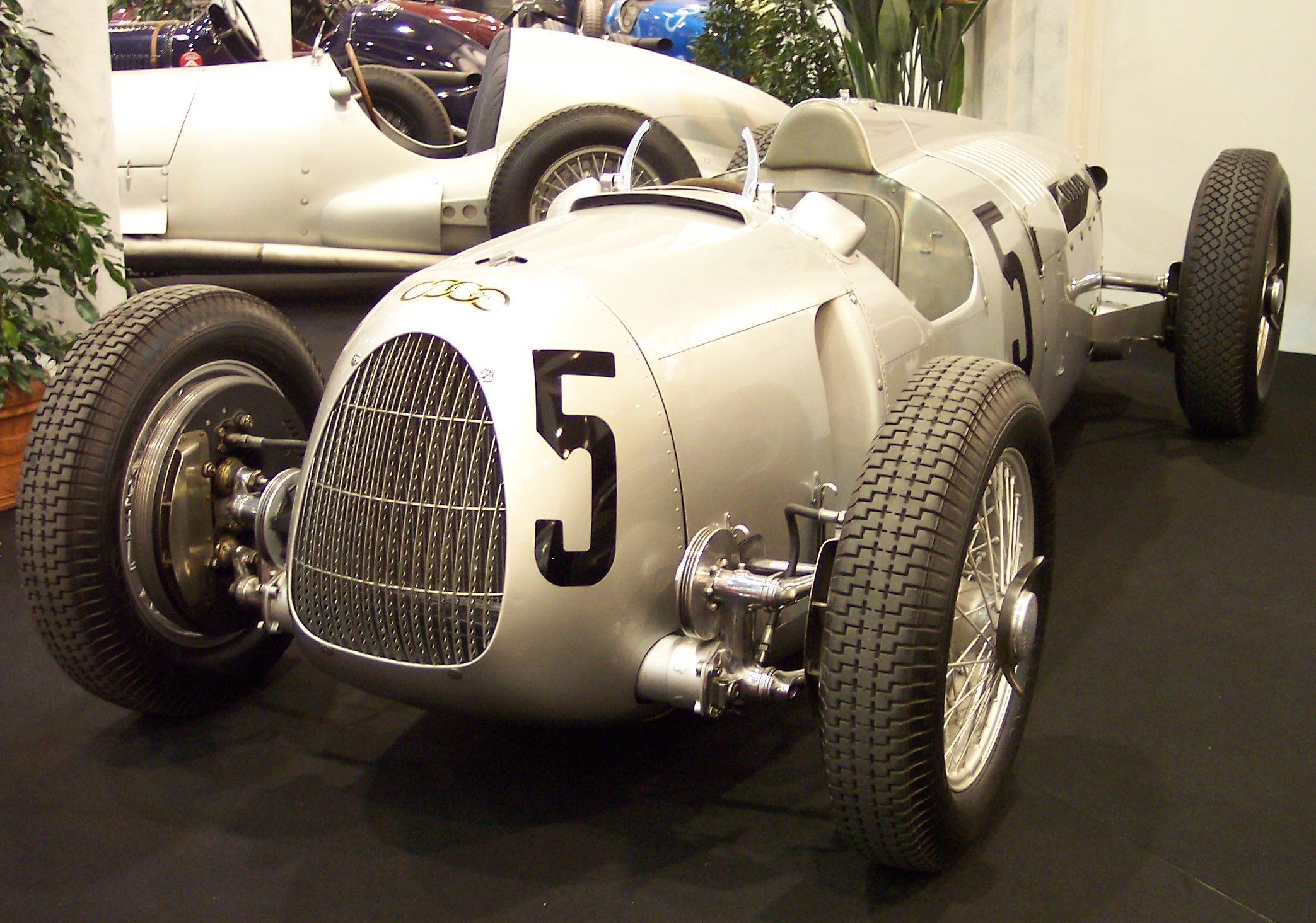 Source: Eigenes Bild